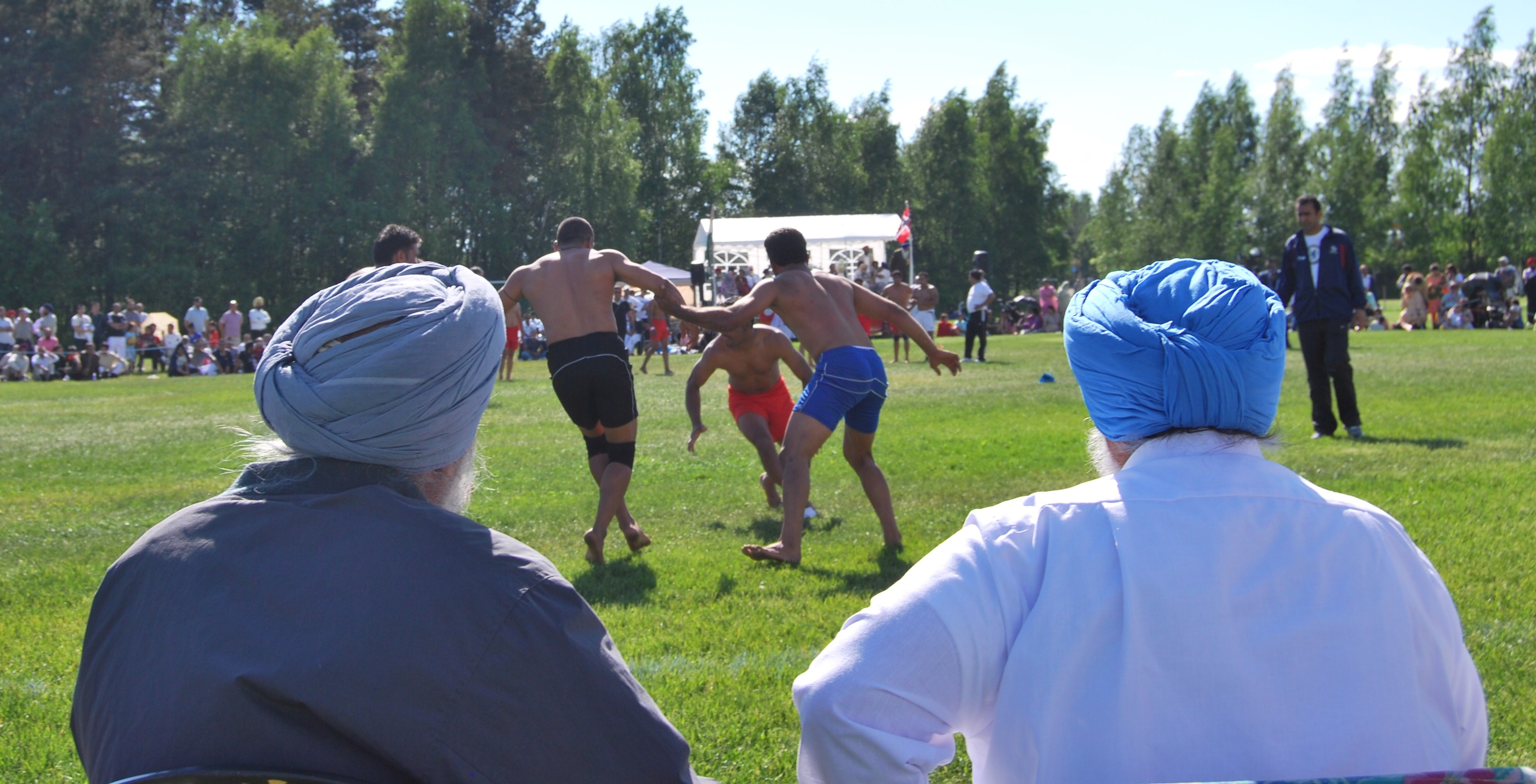 Kabaddi.